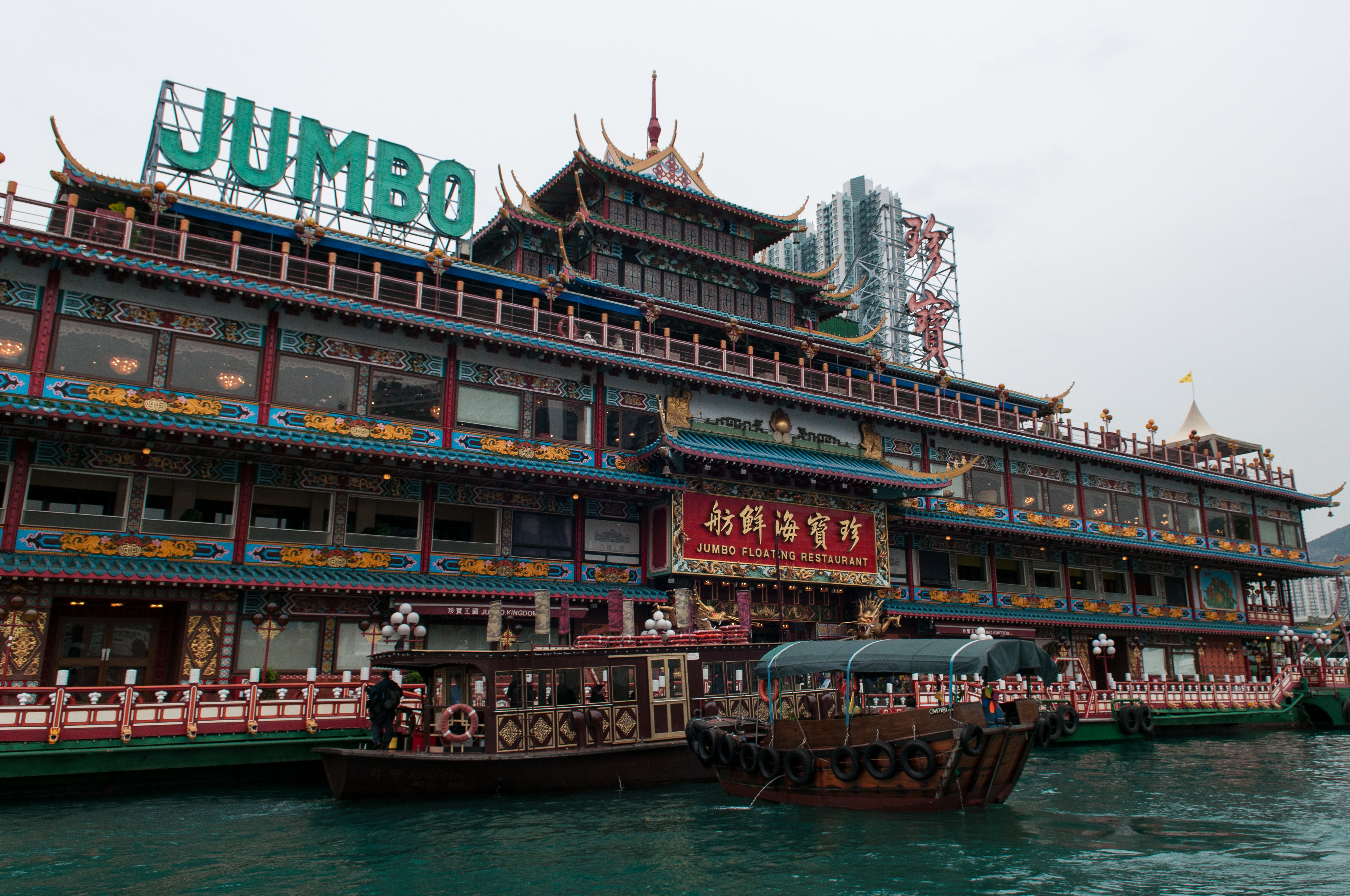 Front of Jumbo Kingdom Restaurant, Aberdeen, Hong Kong